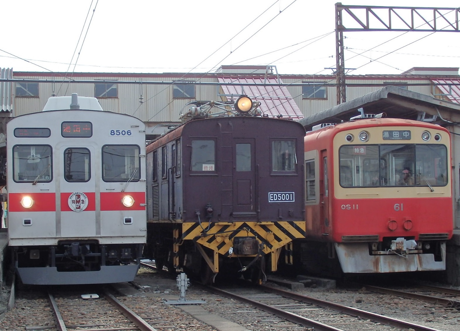 長野電鉄イベント「S11編成＆ED5001形 お別れ会」での展示。左から8500系、ED5000形5001号、10系。